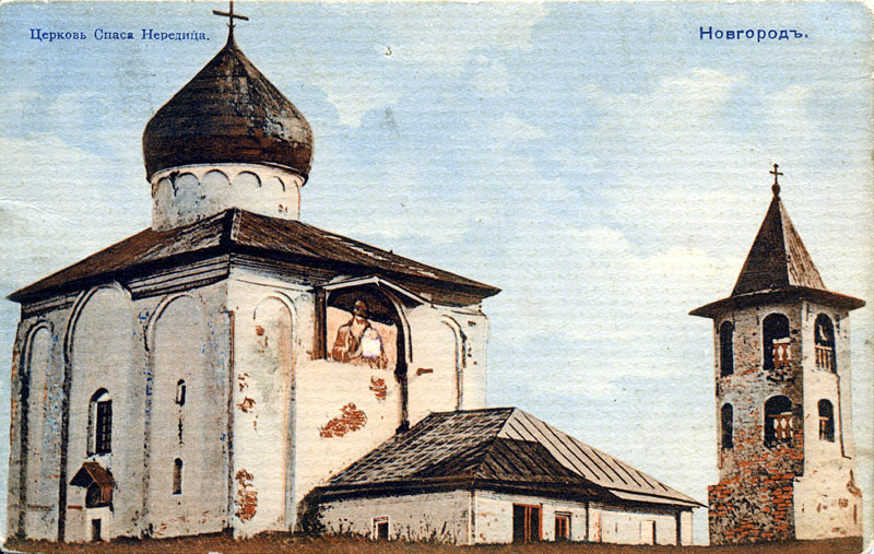 Церковь Спаса на Нередице (Открытка)